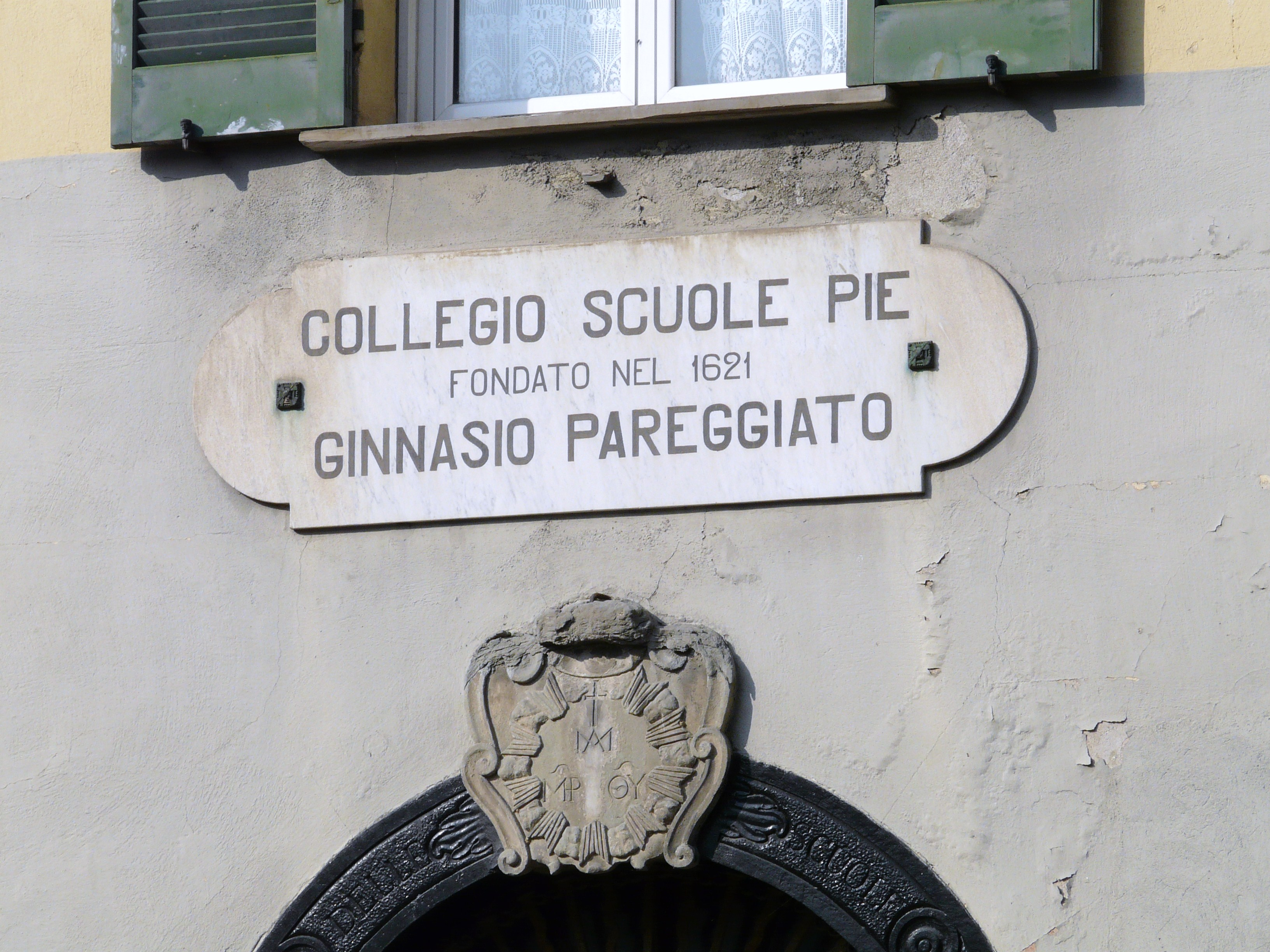 Collegio Scuole Pie, Carcare, Liguria, Italia